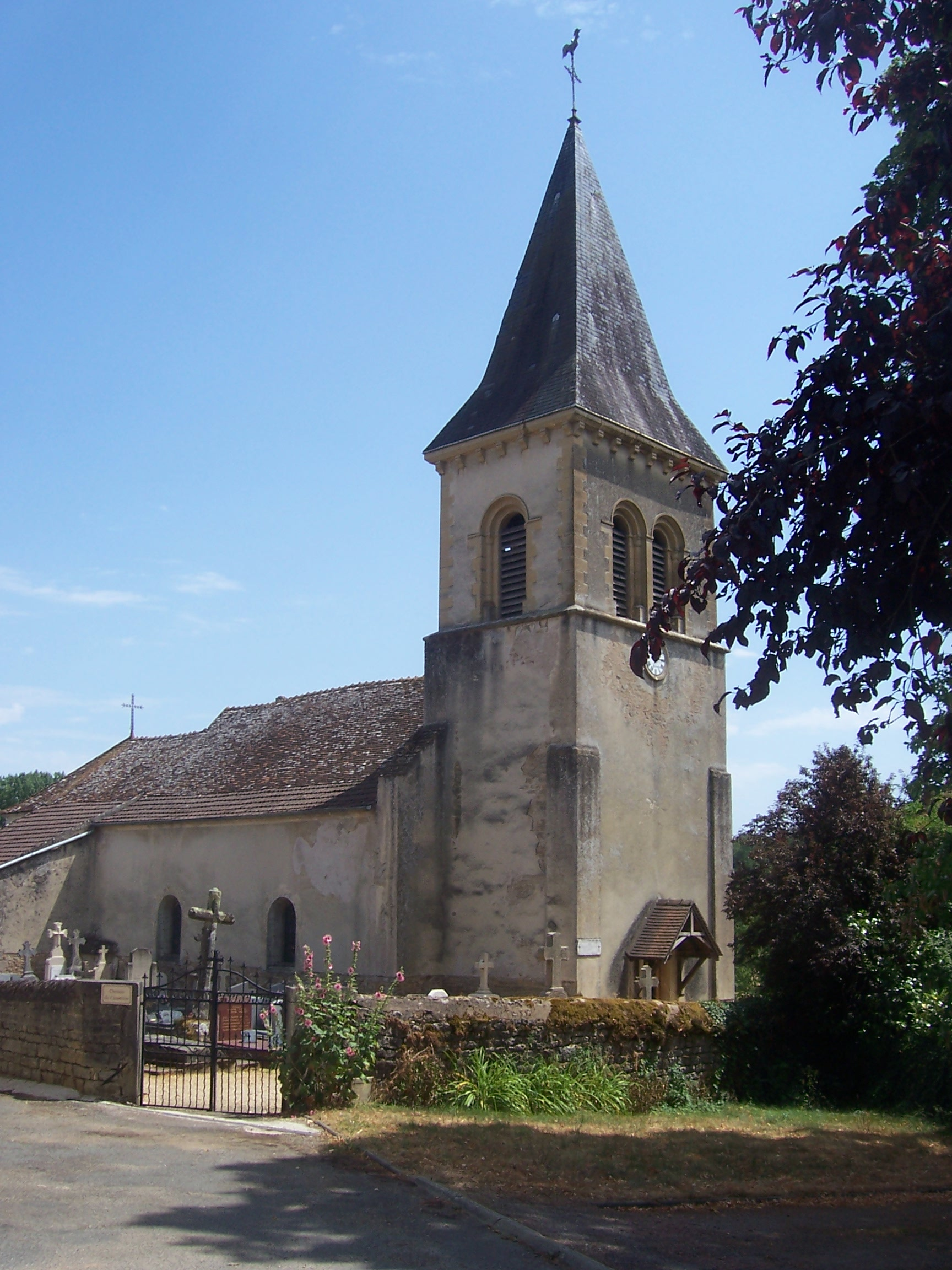 Eglise de Saint-Marcelin-de-Cray